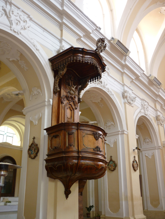 San Giovanni in Fiore - Chiesa Madre, pulpito in legno del '700